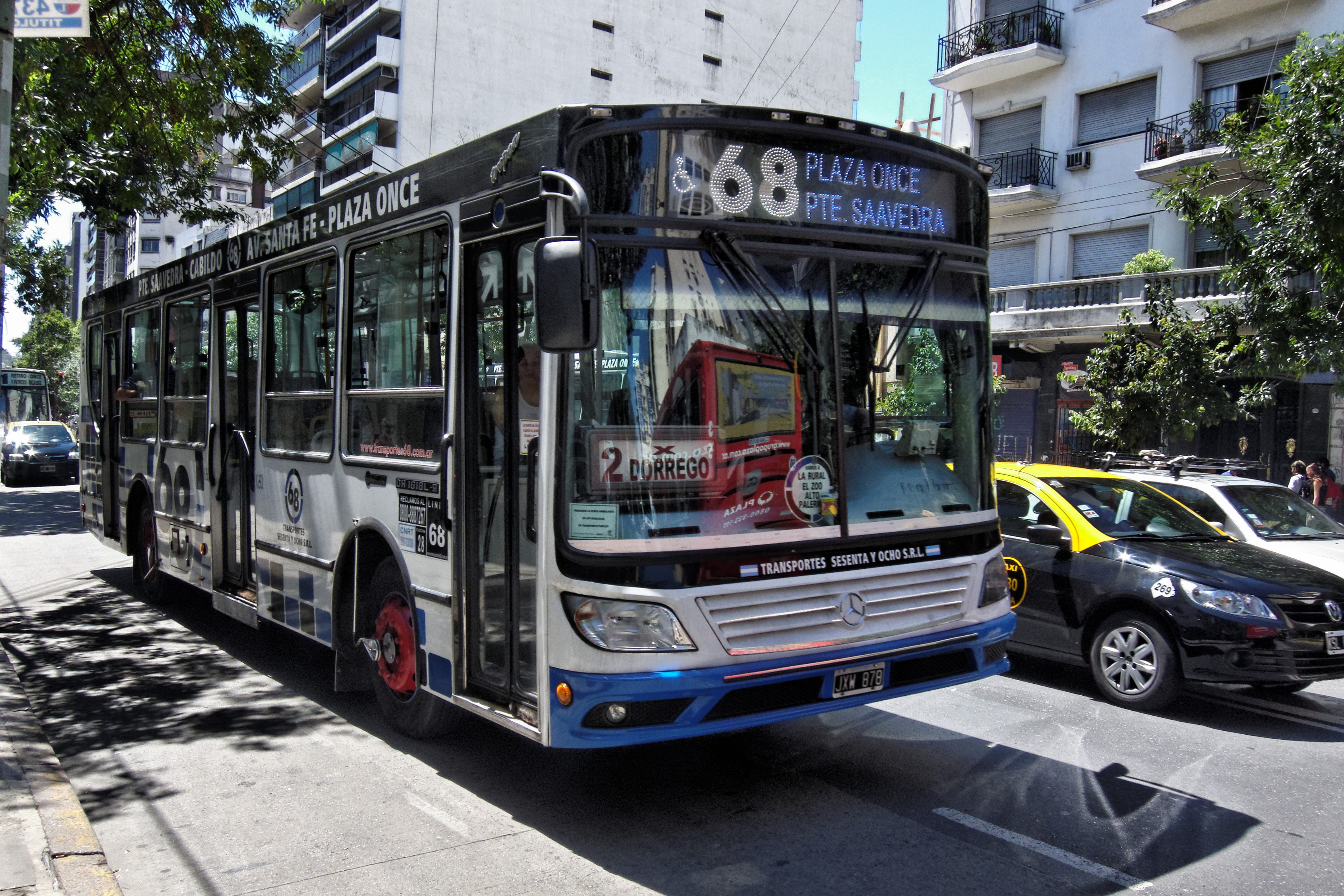 Colectivo línea 68, interno 28, matrícula JXW-878, chasis Mercedes-Benz OH 1618 L SB, carrocería Italbus Tropea. Buenos Aires, Argentina.